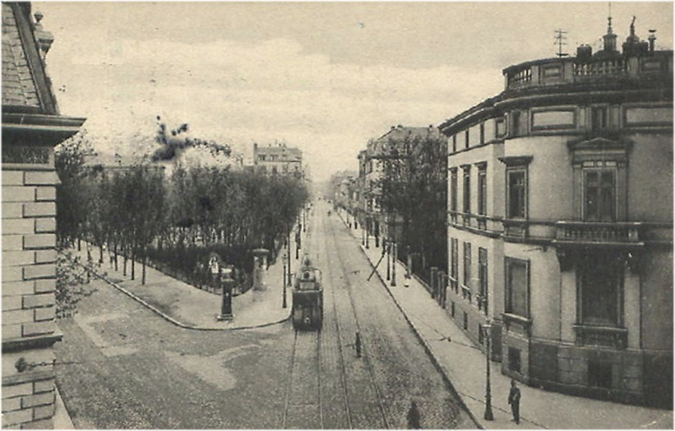 Mathildenplatz Ecke Bieberer Straße 1906-1911, die St. Marienkirche fehlt noch.